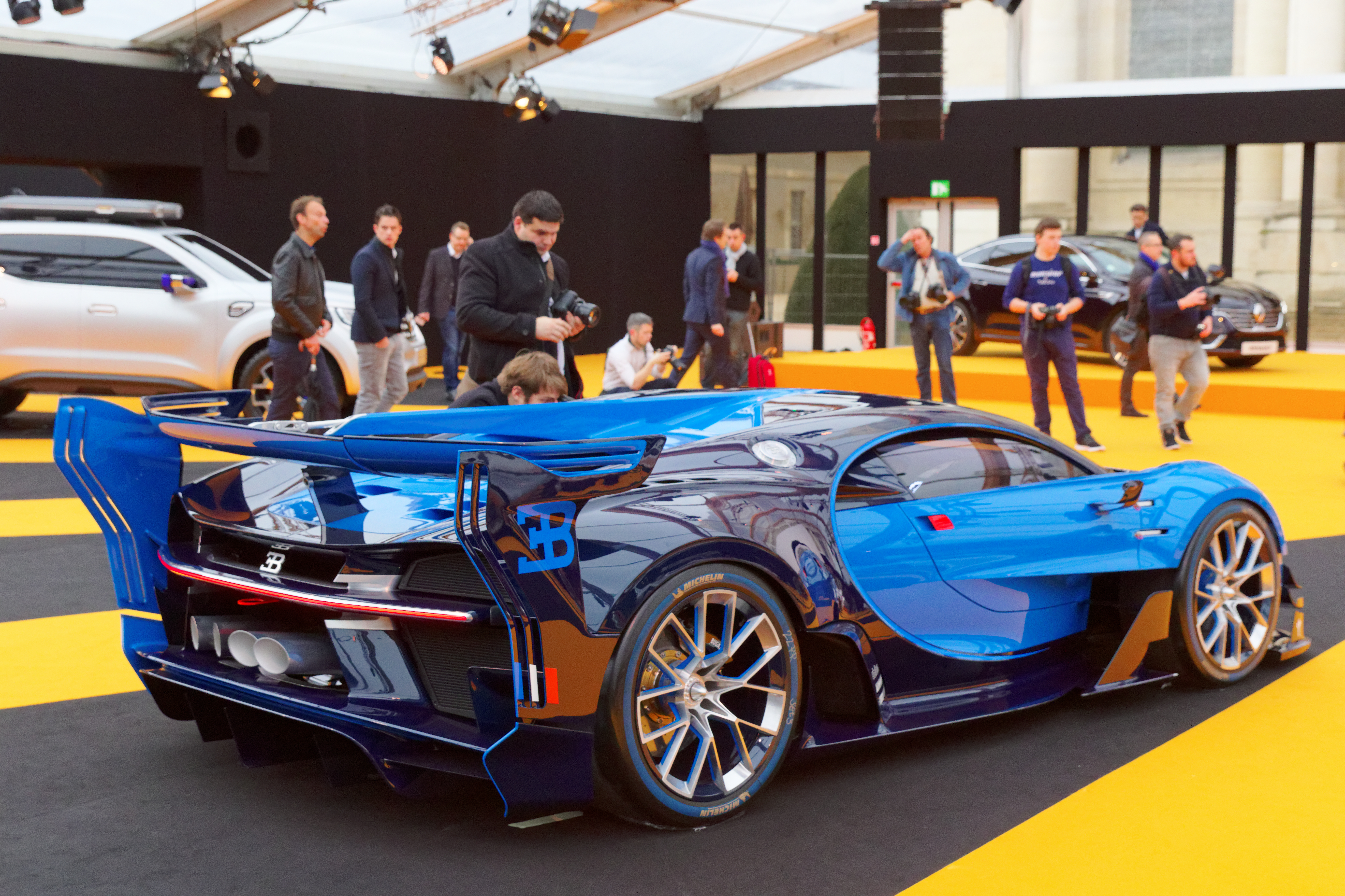 La Bugatti Vision Gran Turismo exposée lors du festival automobile international 2016.